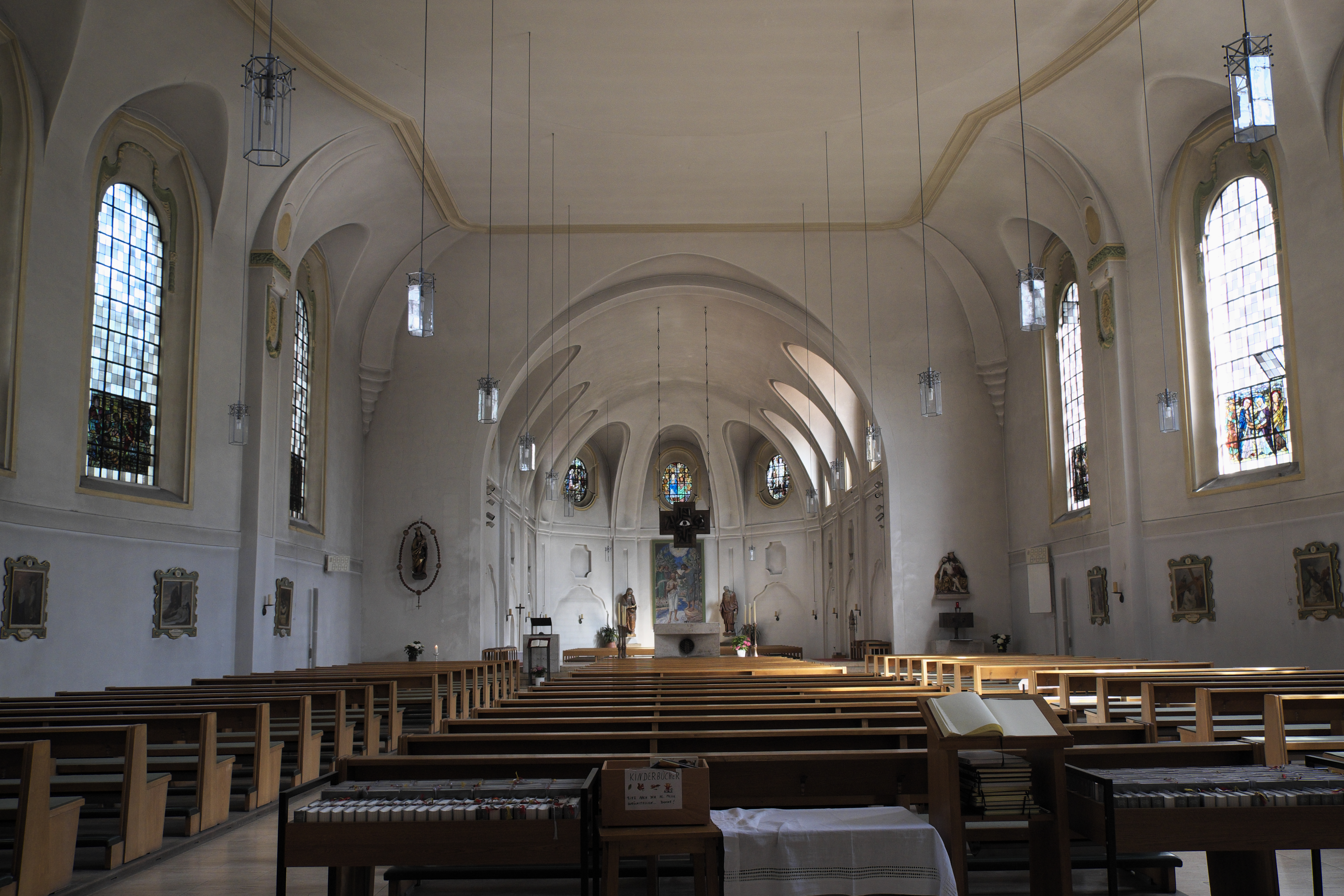 Katholische Pfarrkirche St. Johann Baptist in Solln im Stadtbezirk Thalkirchen-Obersendling-Forstenried-Fürstenried-Solln in München (Bayern/Deutschland), Innenraum